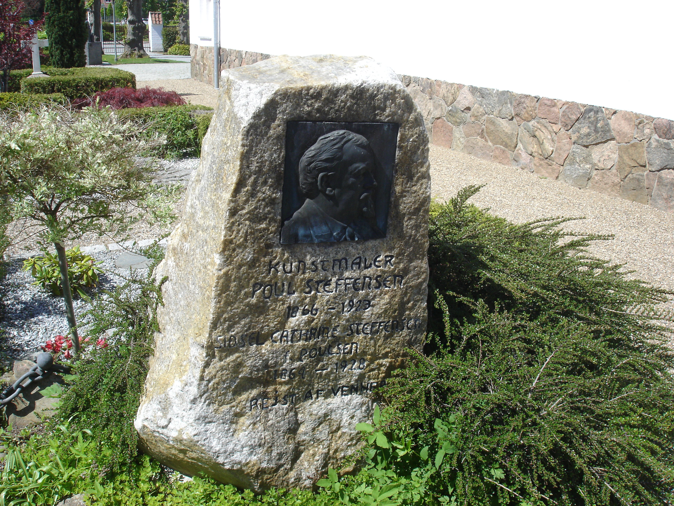 Kunstmaler Poul Steffensens gravsten på Ry Kirkegård, udført af Elias Ølsgaard 1924